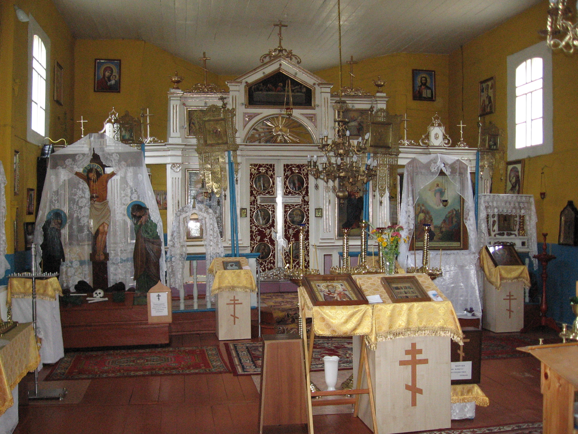 Беларуская (тарашкевіца): Царква сьвятога Мікалая (Вяжное). Інтэр'ер - Царскія вароты. This is a photo of Belarusian heritage monument. Reference number: 113Г000604 ( WLM)